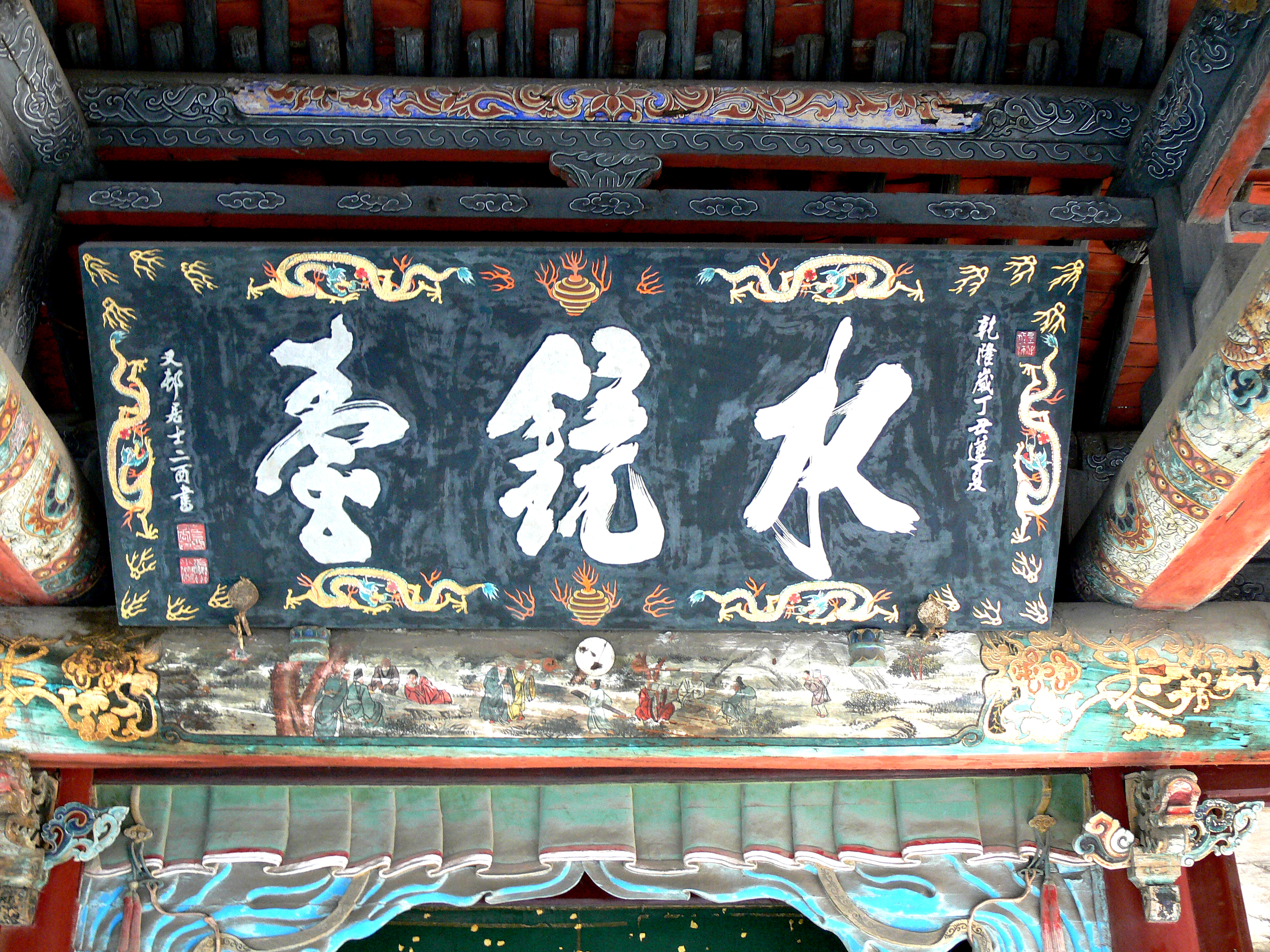 乾隆年间水镜台匾额